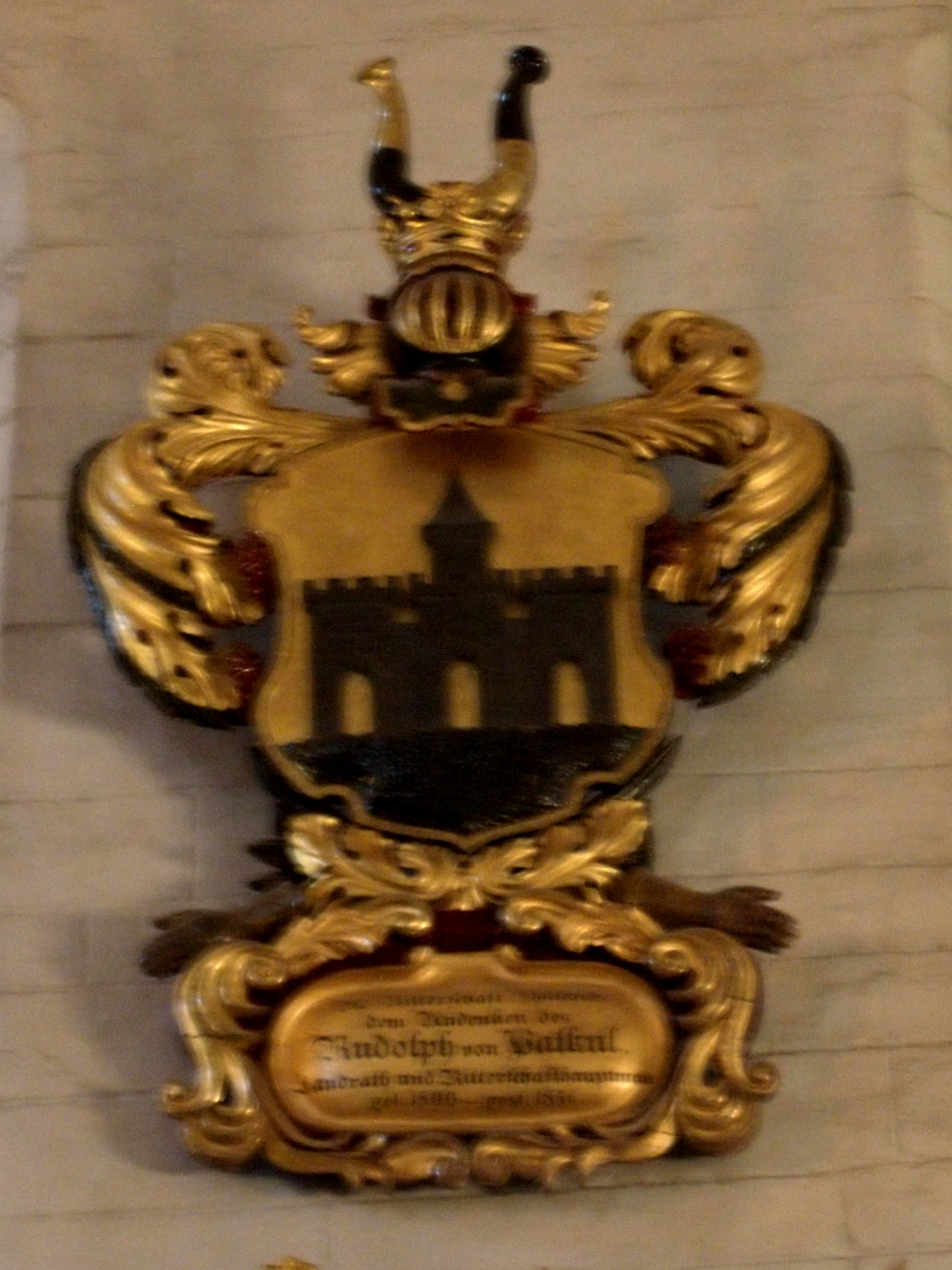 Paul Eduard von Focki vappepitaaf Tallinna Toomkirikus